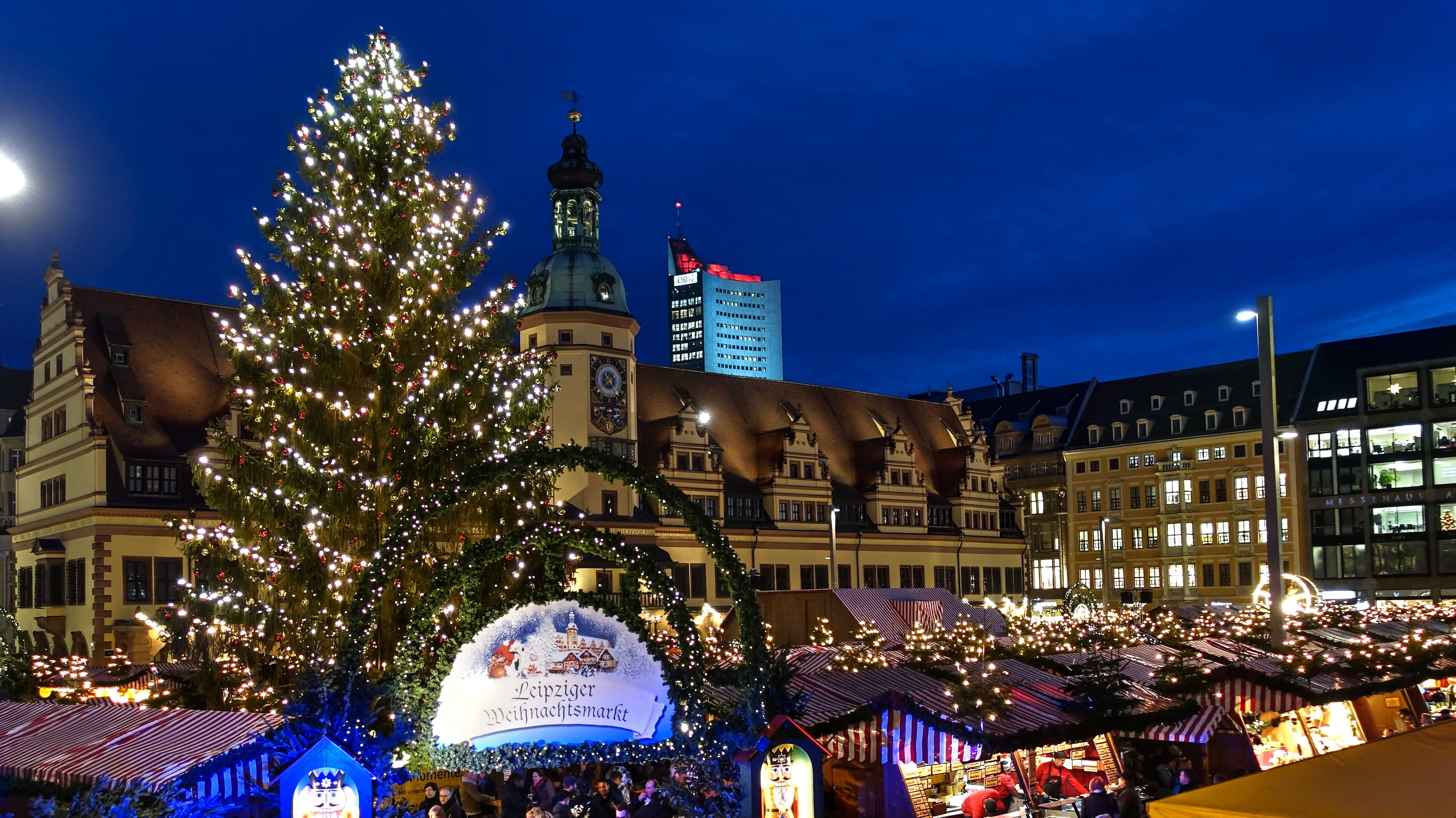 Der Weihnachtsmarkt in Leipzig 2019 - Blick zur blauen Stunde über den Markt zur Weihnachtstanne und zum Rathaus von der Nordwest-Ecke des Marktplatzes